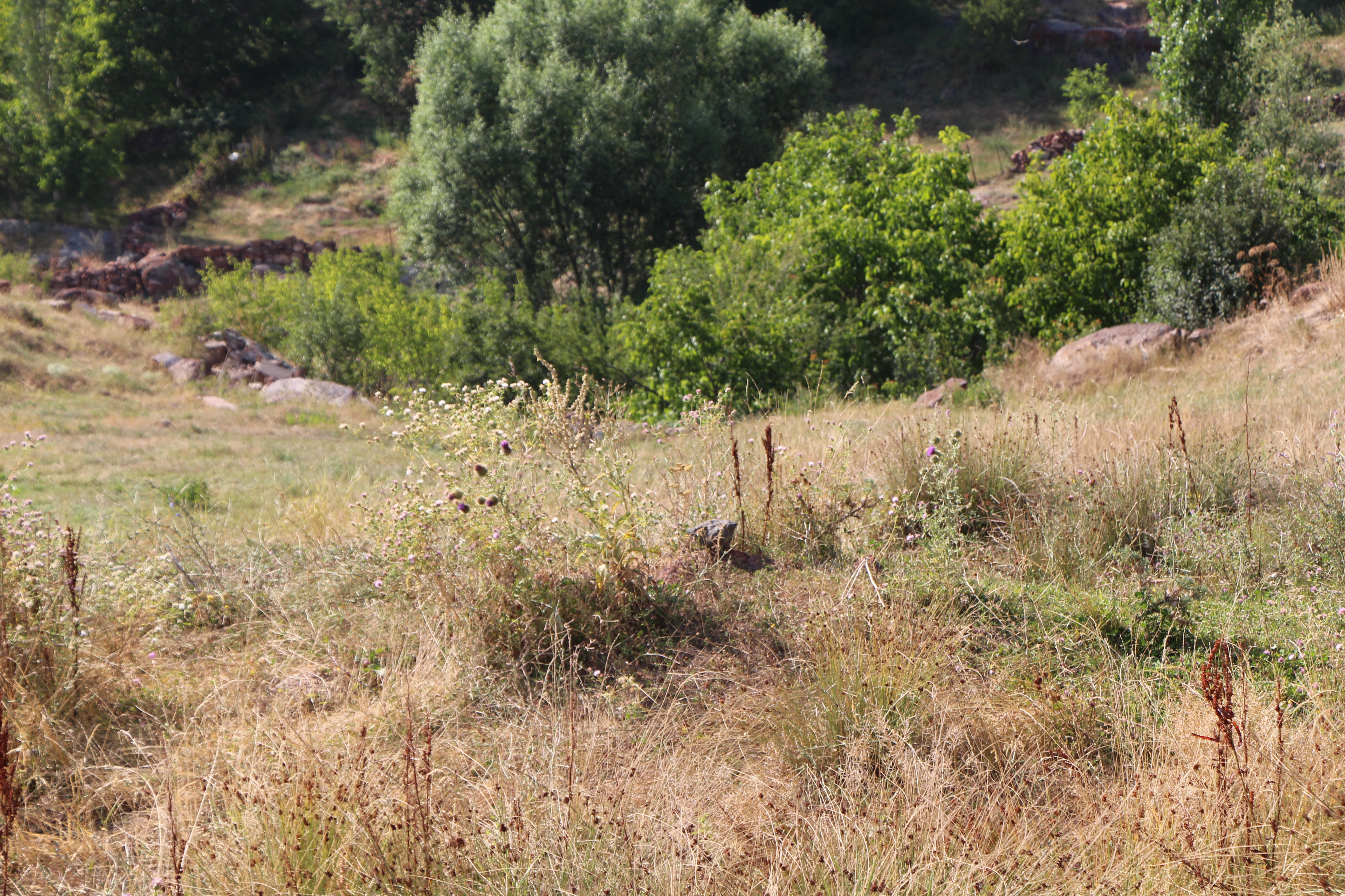 Կաթնաղբյուր, Արագածոտնի մարզ, ԱՄՐՈՑ մթա 3-2 հզմ - մթ 1 դ. 0,5 կմ հվ-աե 2.57/1 Իրինդ տանող ճանապարհի աջ կողմում 57/1